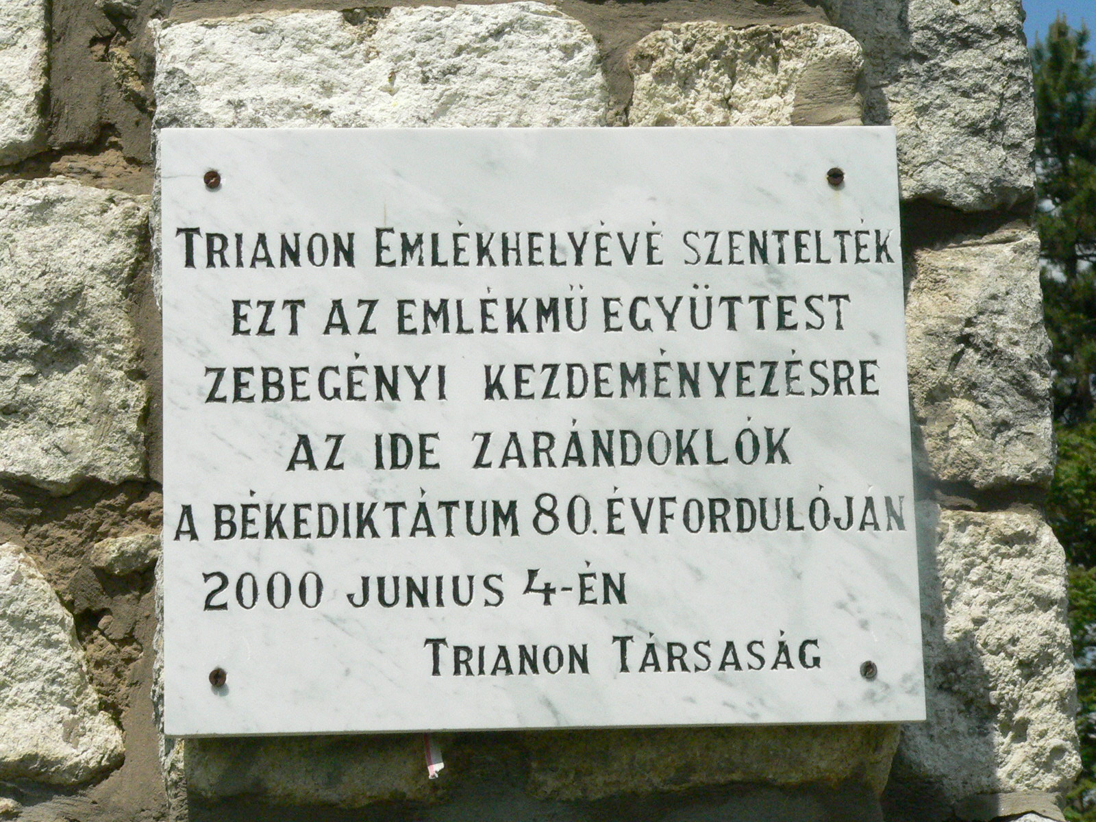 Zebegény, Országzászló és hősi emlékhely, a tervező Maróti Géza emléktáblája